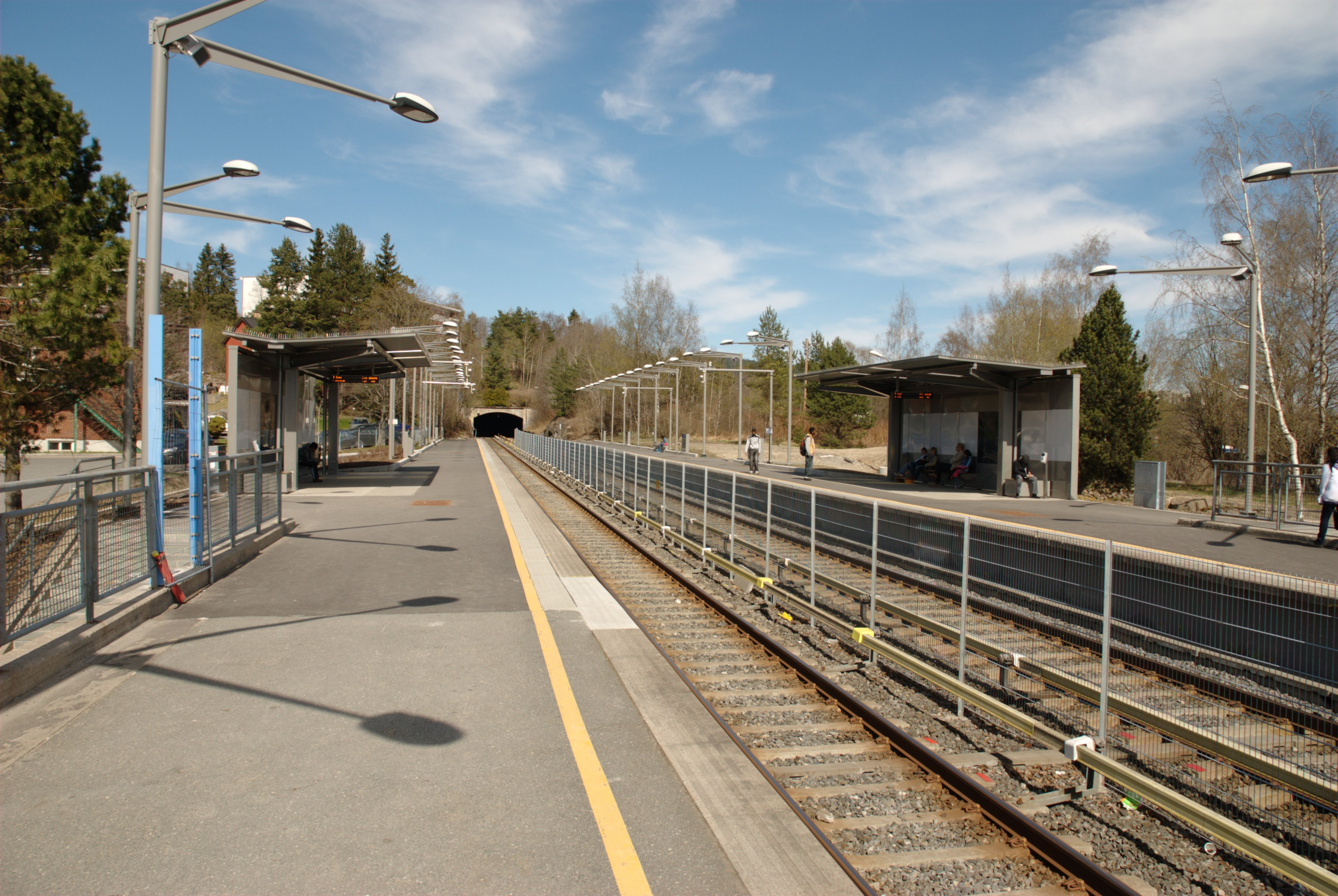 Kalbakken is the station on Grorudbanen between Rødtvet and Ammerud.